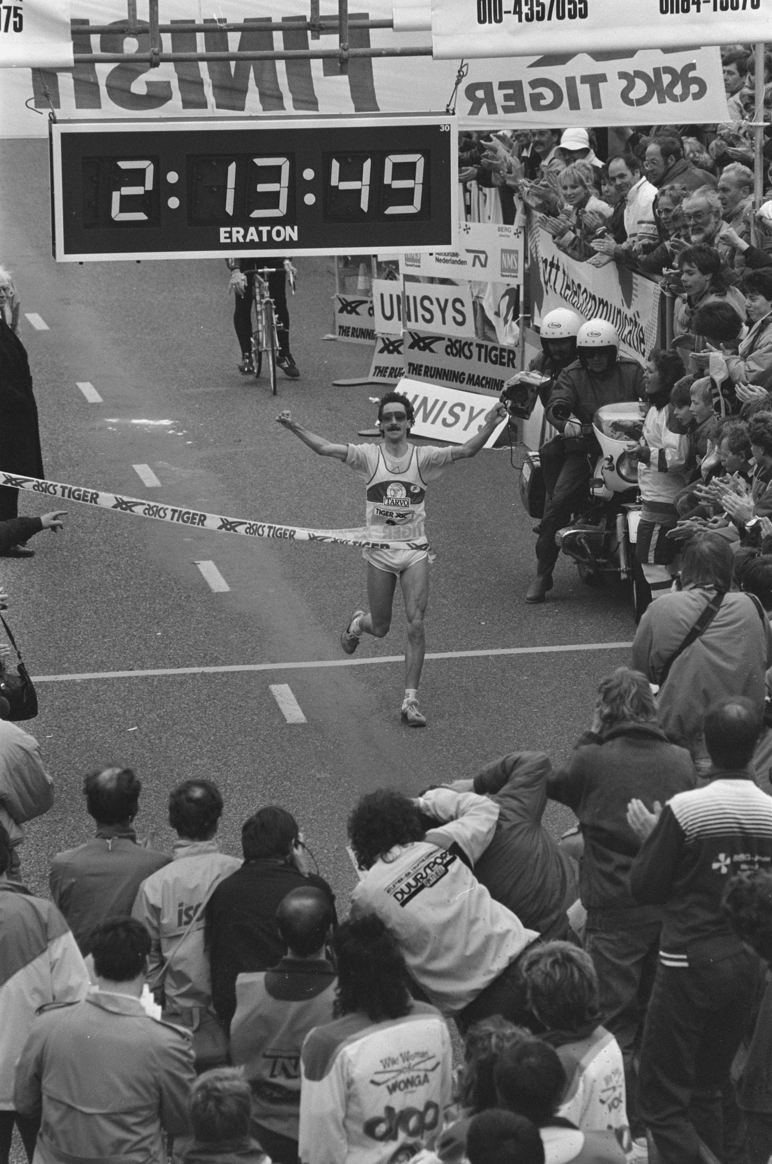 Collectie / Archief : Fotocollectie Anefo Reportage / Serie : [ onbekend ] Beschrijving : Westland marathon: winnaar Marti ten Kate gaat over finish Datum : 11 april 1987 Locatie : Westland, Zuid-Holland Trefwoorden : Winnaars, hardlopen Fotograaf : Croes, Rob C. / Anefo Auteursrechthebbende : Nationaal Archief Materiaalsoort : Negatief (zwart/wit) Nummer archiefinventaris : bekijk toegang 2.24.01.05 Bestanddeelnummer : 933-9495